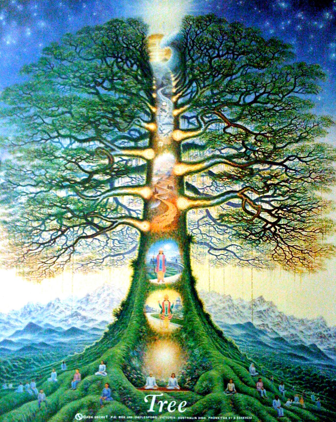 Der Baum des Lebens, australische Darstellung